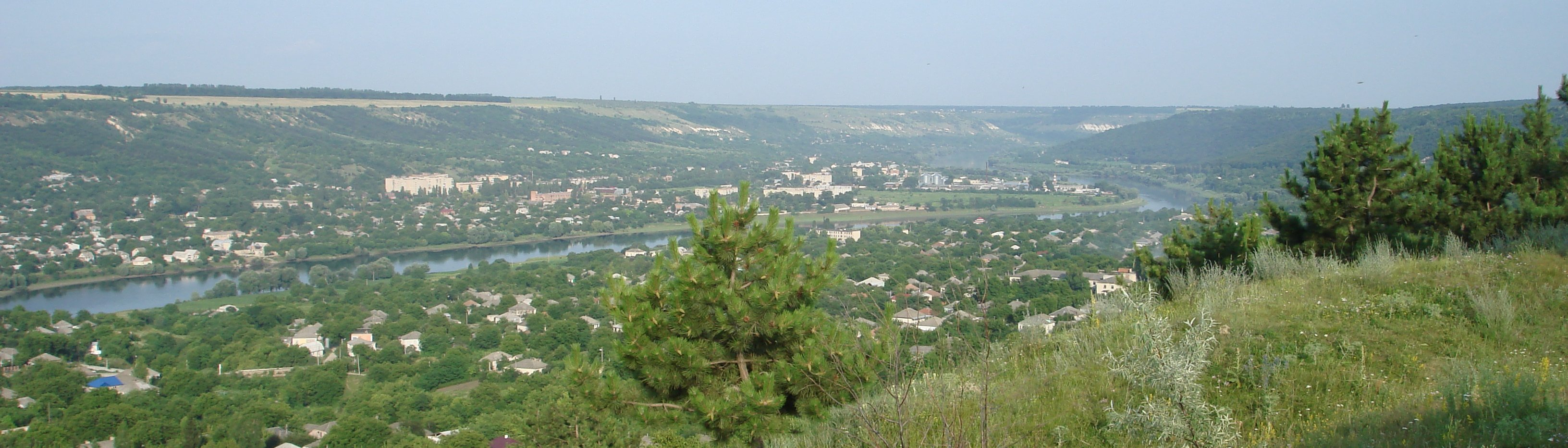 Днестр возле Атак и Каларашовки